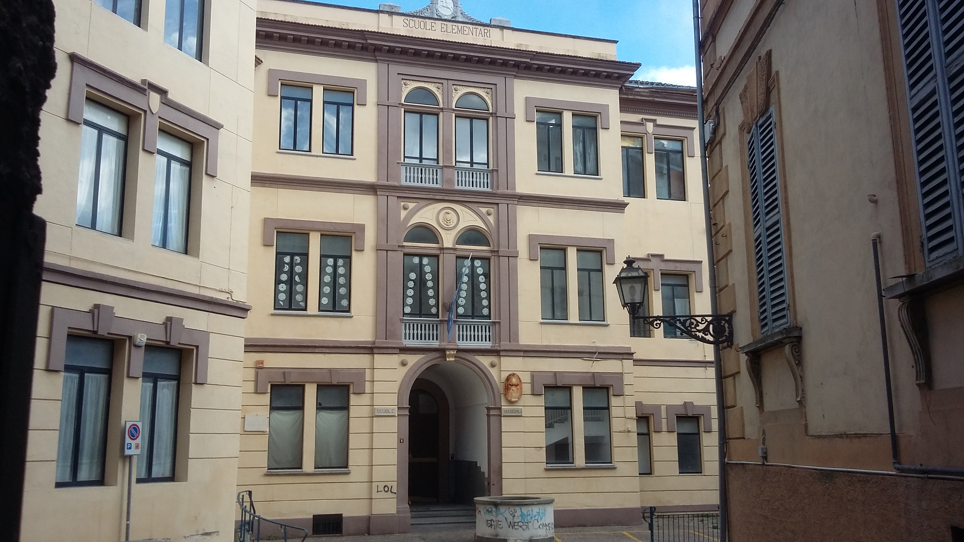 Chieti, Piazza De Laurentiis Le Scuole Nolli furono la prima scuola pubblica di Chieti.